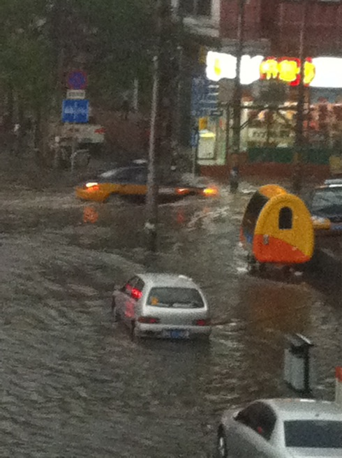 2011年6月23日强降雨安立路辅路路面情况，可见已被大水浸泡几乎达一个车轮的深度。